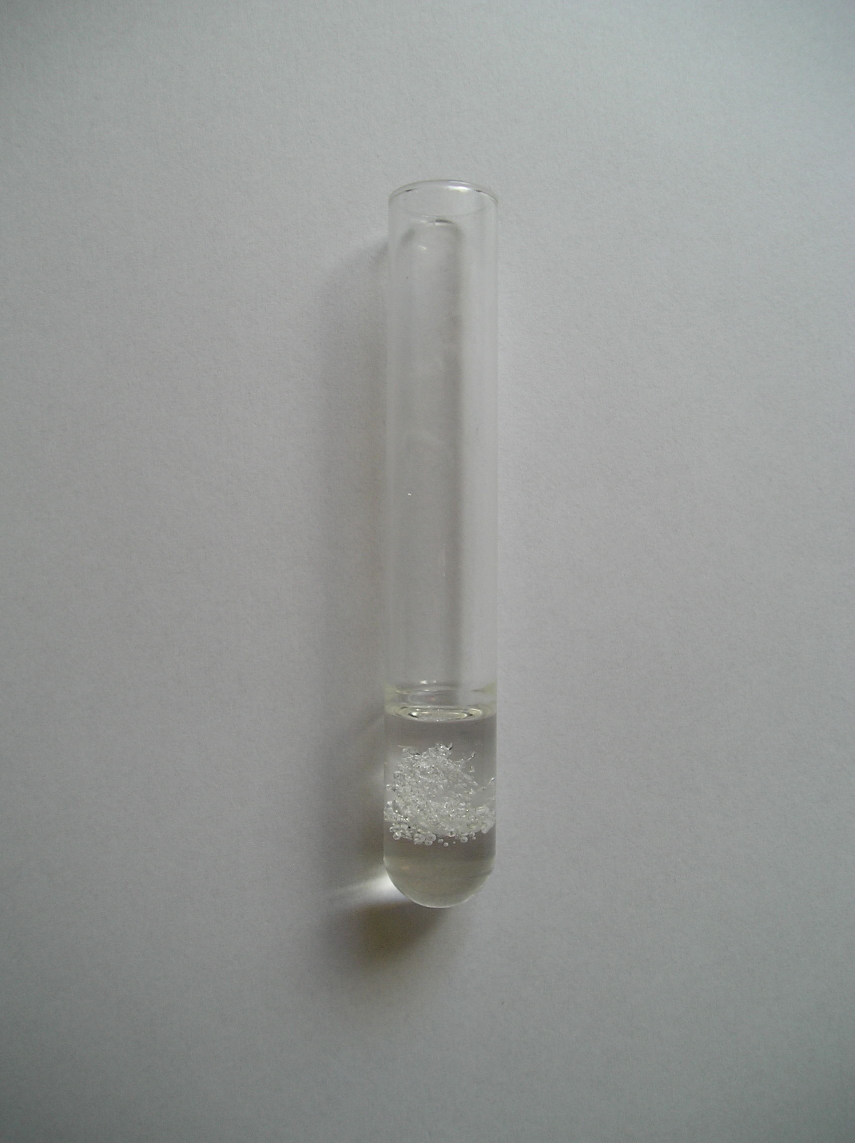 Poli(metakrylan metylu): środkowa warstwa przegrzana